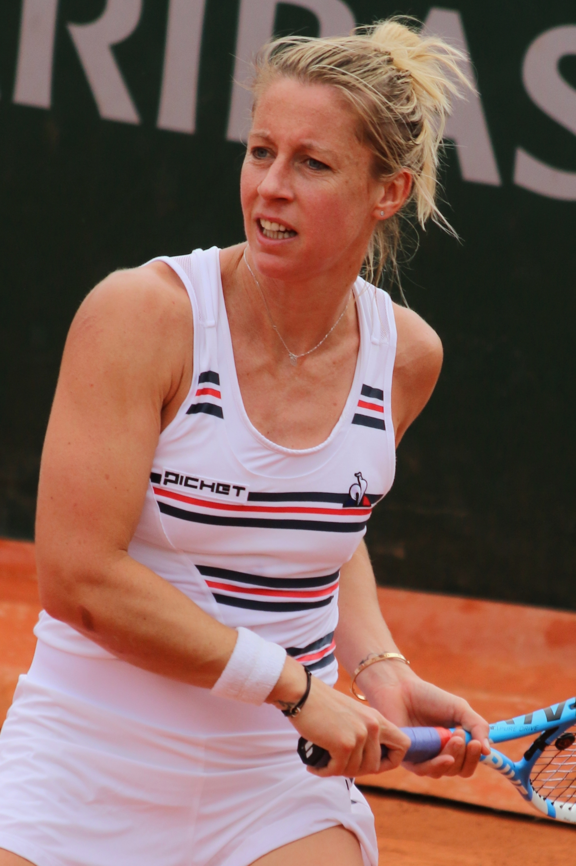 Parmentier RG19 (37)